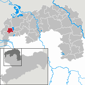 Zwochau in Saxony - Landkreis Nordsachsen